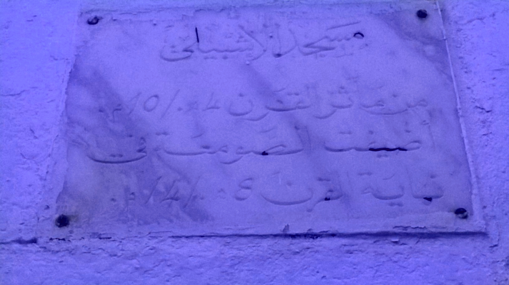 La médina de Tunis مدينة تونس العتيقة